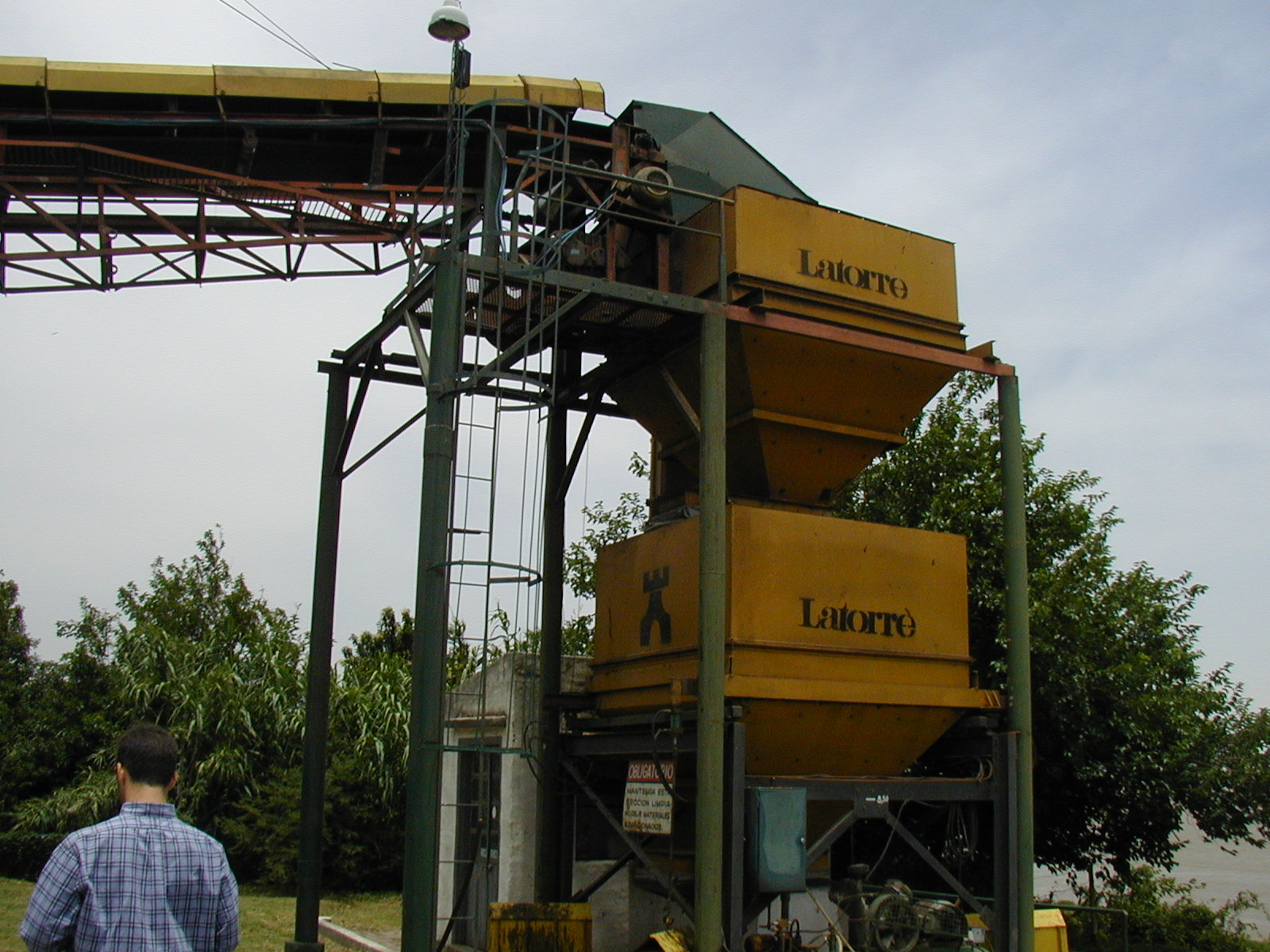 Break bulk cargo weighing sistem. Bascula para pesar graneles